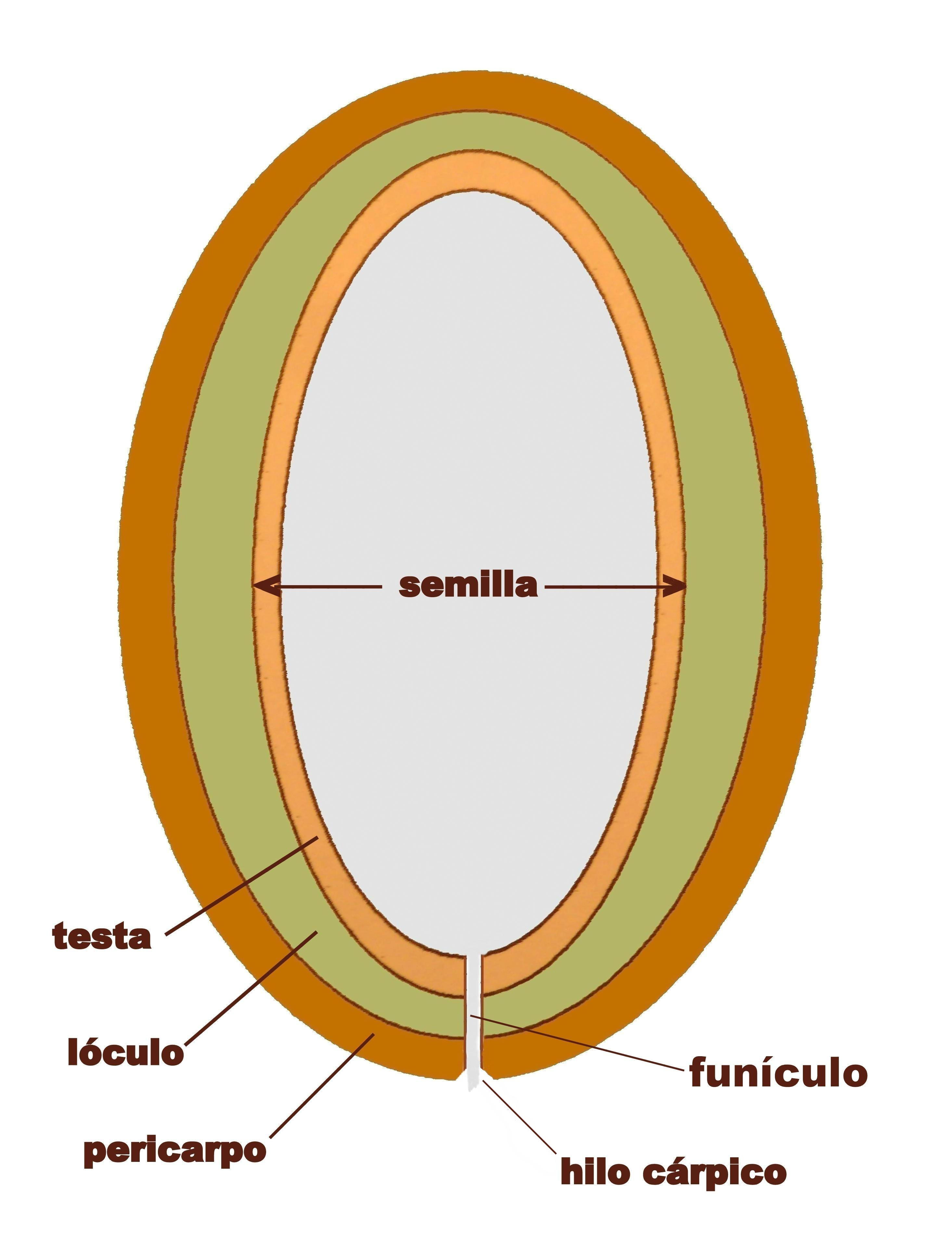 Morfología de un aquenio (fruto seco derivado de un ovario supero, indehiscente, monocarpelar y con la semilla y su testa no adherida al pericarpo): corte longitudinal esquemático.